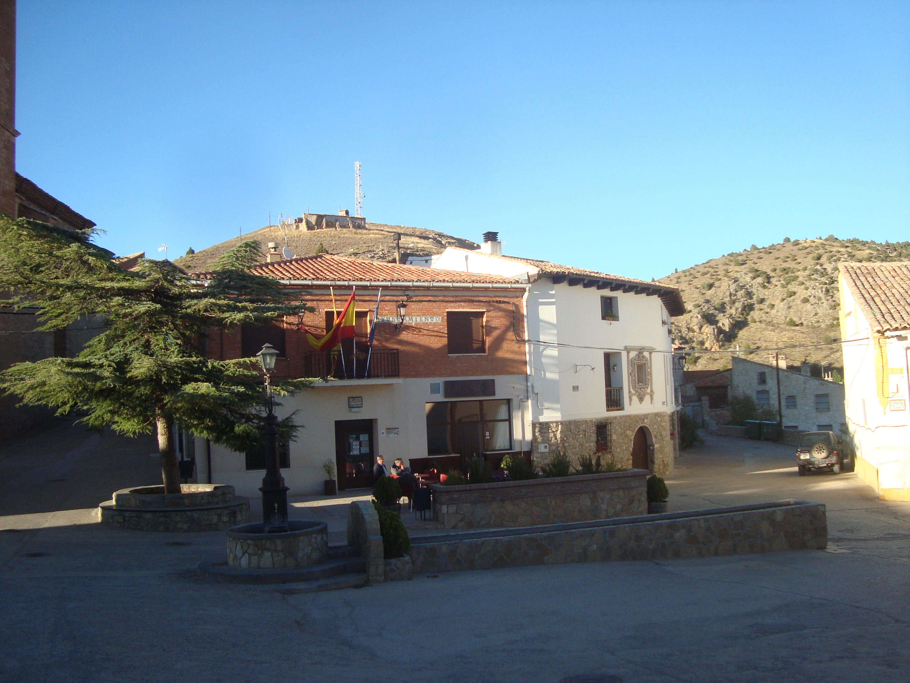 Plaza José María Regal, Cubla, Teruel. Cubla es un municipio de la provincia de Teruel (Aragón, España). Pertenece a la comarca Comunidad de Teruel. Está enclavado en las faldas de la sierra de Javalambre, a 1088 m. de altitud.